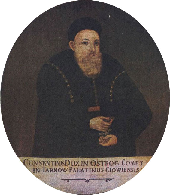 Беларуская (тарашкевіца): Партрэт Канстантына Васіля Астроскага (Kanstantyn Vasil Astroski)